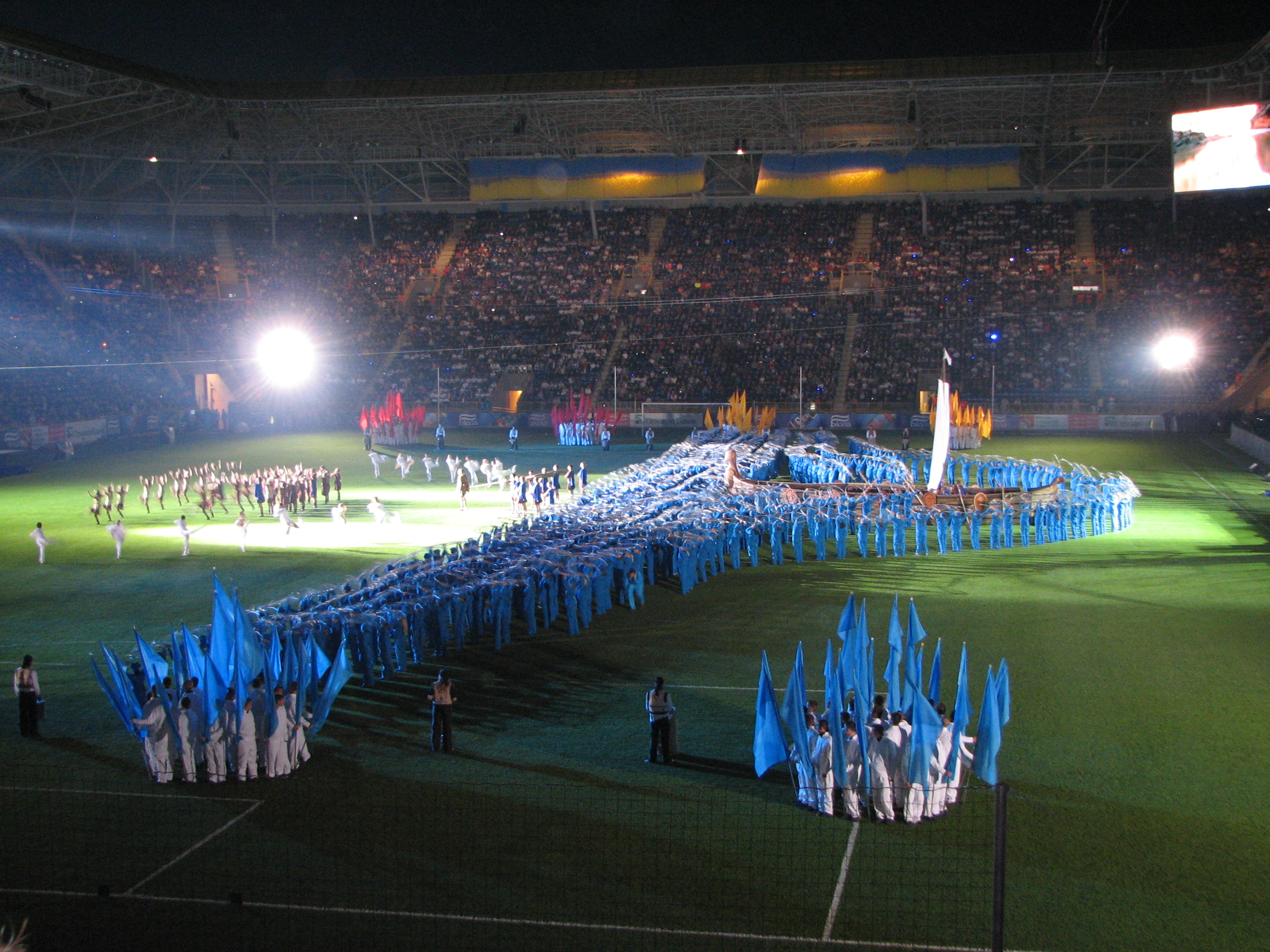 Урочисте відкриття стадіону «Дніпро»